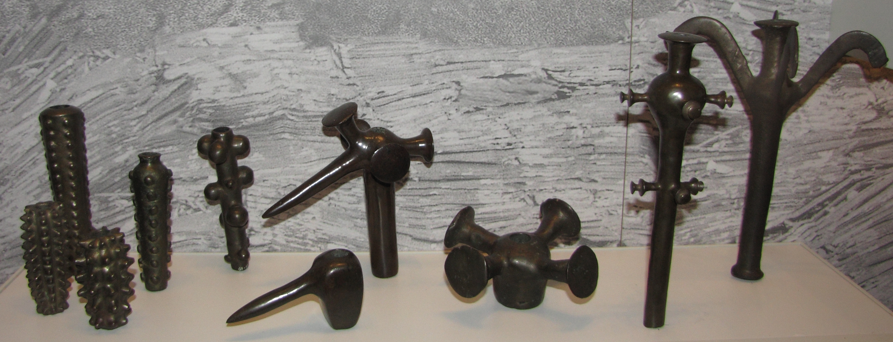 מספר פריטים ממטמון נחל משמר